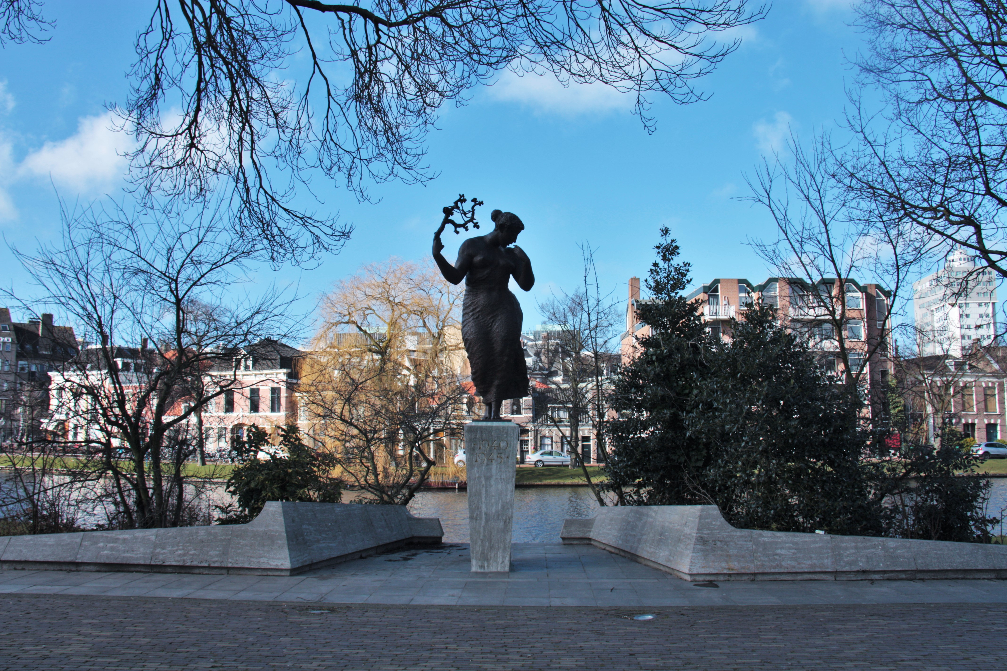 Меморіал на честь звільнення Лейдена від нацистів